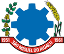 Brasão do município de São Miguel do Iguaçu, Paraná, Brasil